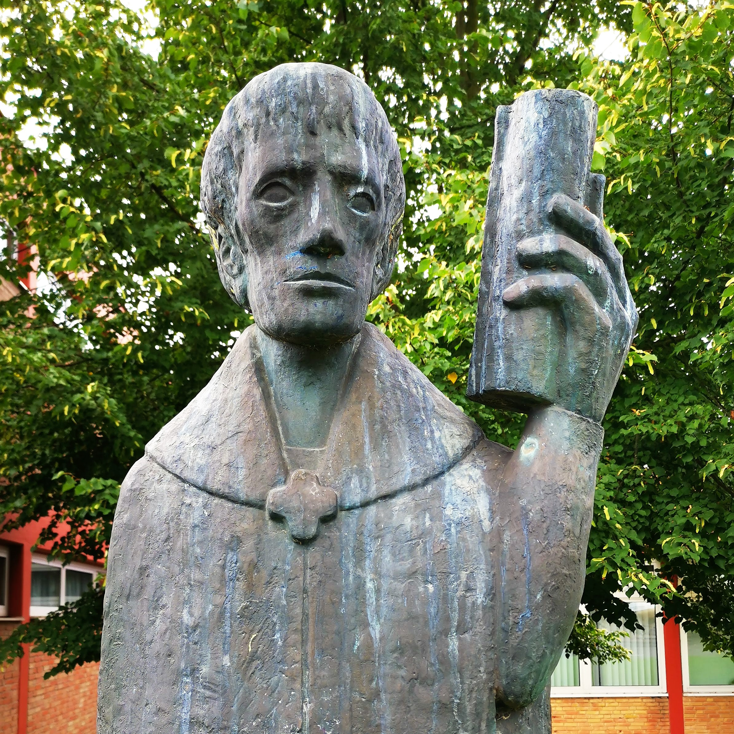 Wittlich, Denkmal zu Ehren von Kurfürst Balduin von Luxemburg, vor der Kurfürst-Balduin-Realschule plus.